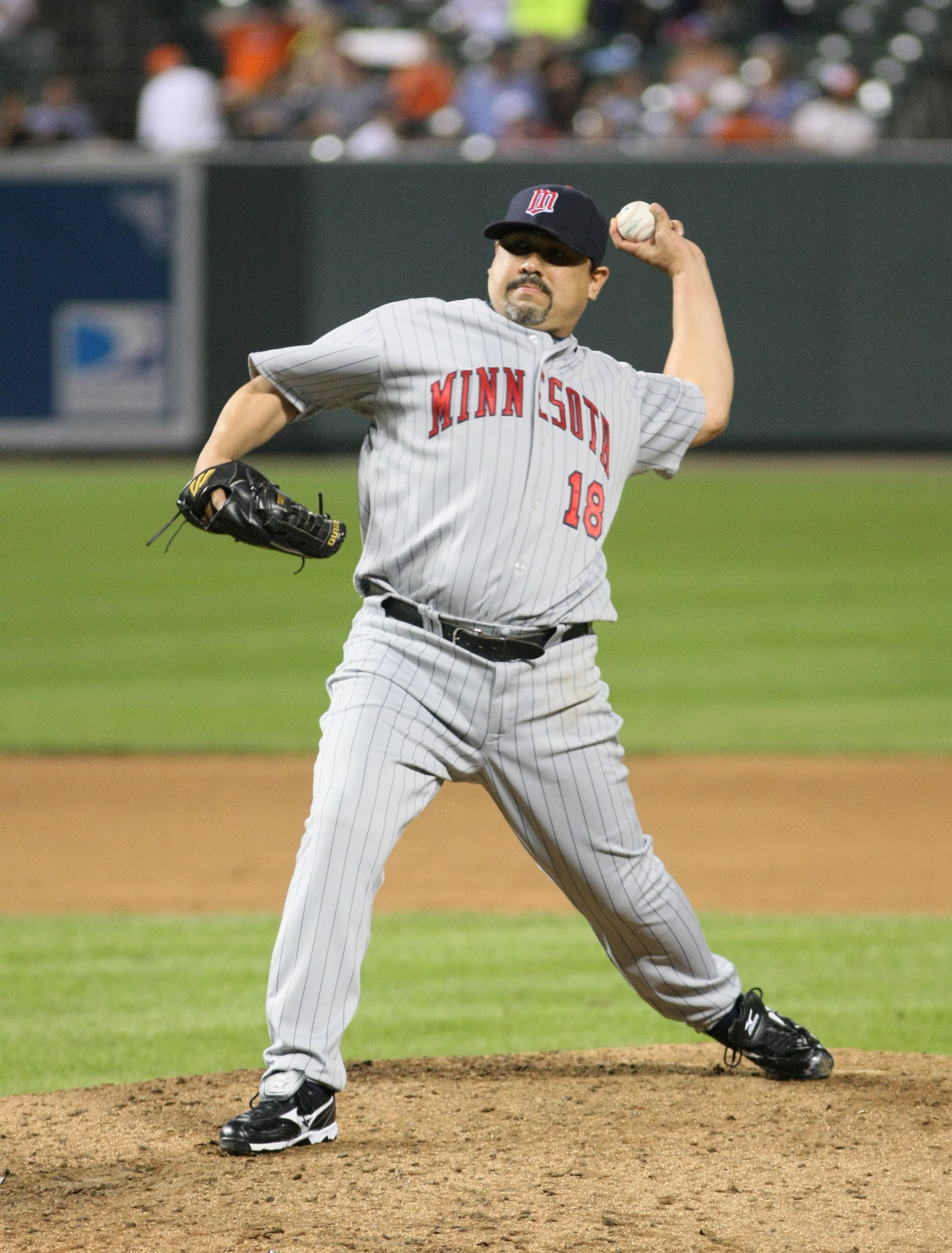 Eddie Guardado